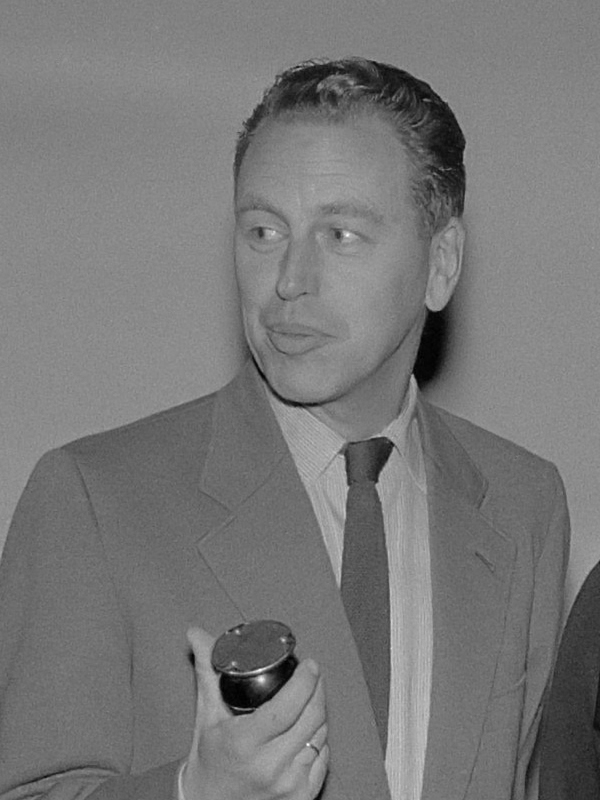 Radiouitzending "Dit is uw Leven" , v.l.n.r. Harry Guyt Bert Garthoff , mevr. Souloumiac , Abbe C. van Doorn 19 november 1958